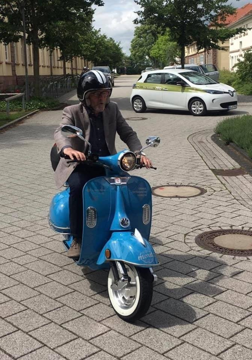 Winfried Hermann am efeuCampus in Bruchsal